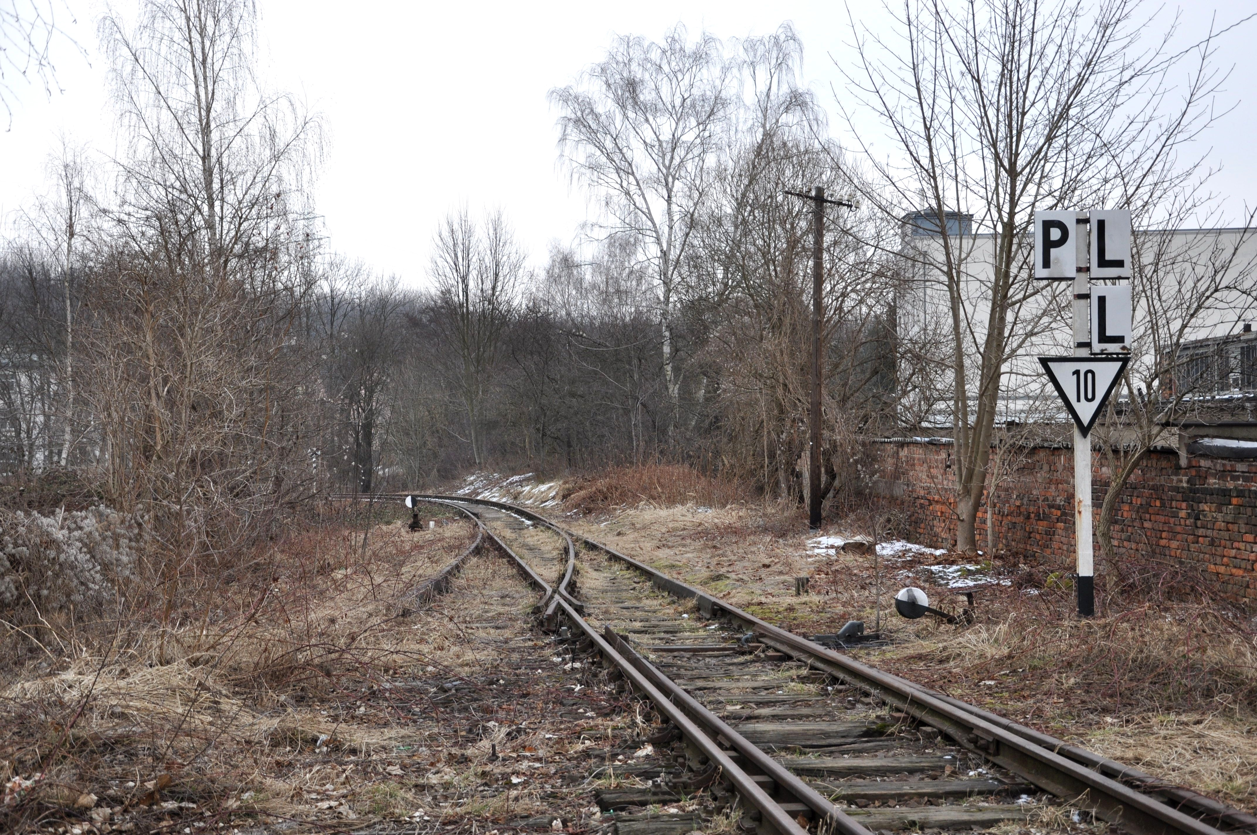 Windbergbahn, Reste der Anschlussweiche Fördertechnik Freital